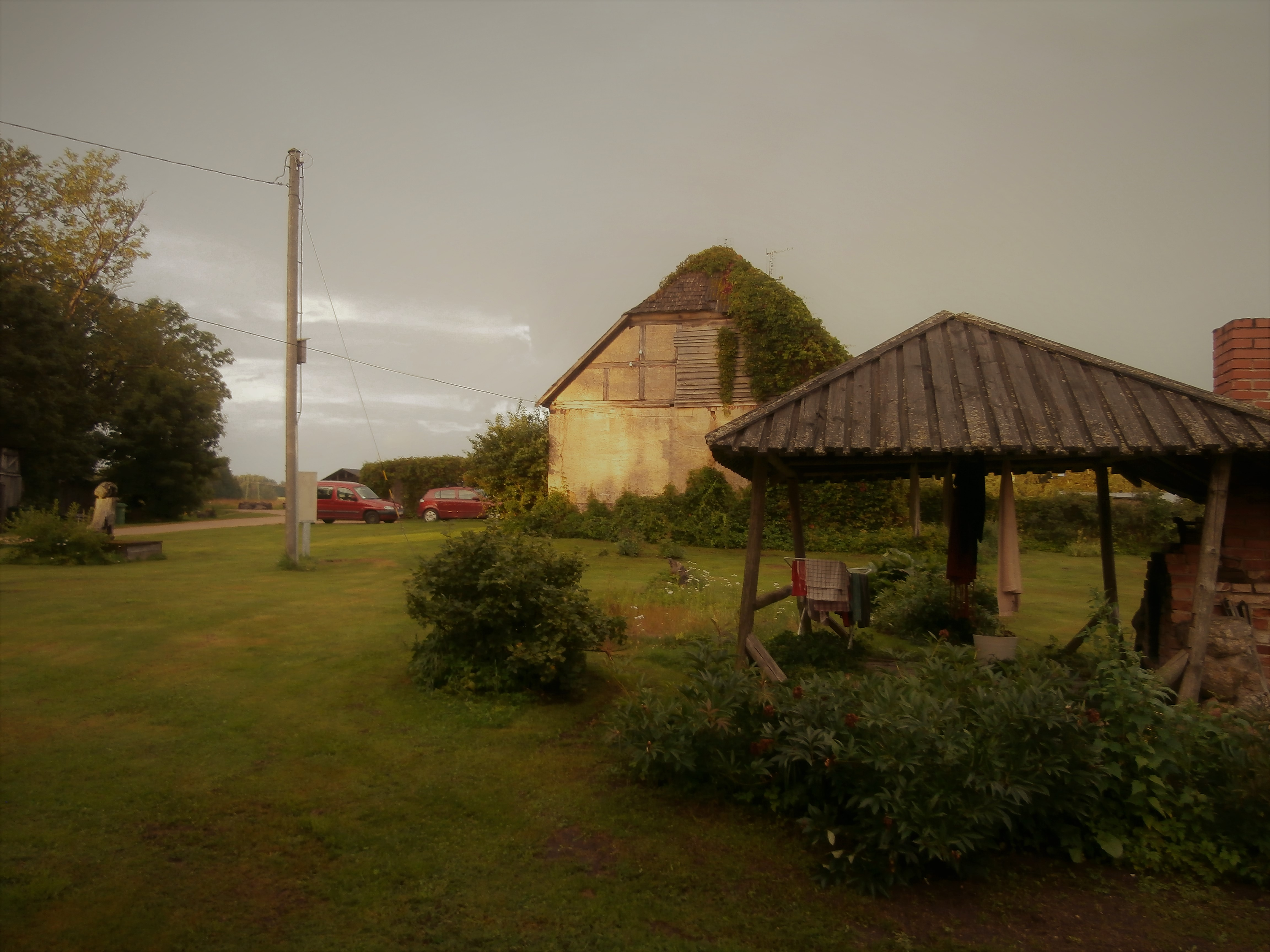 Linnuseala idakülg, vaade pastoraadi juurest ida suunas, mõisa abihoonele.